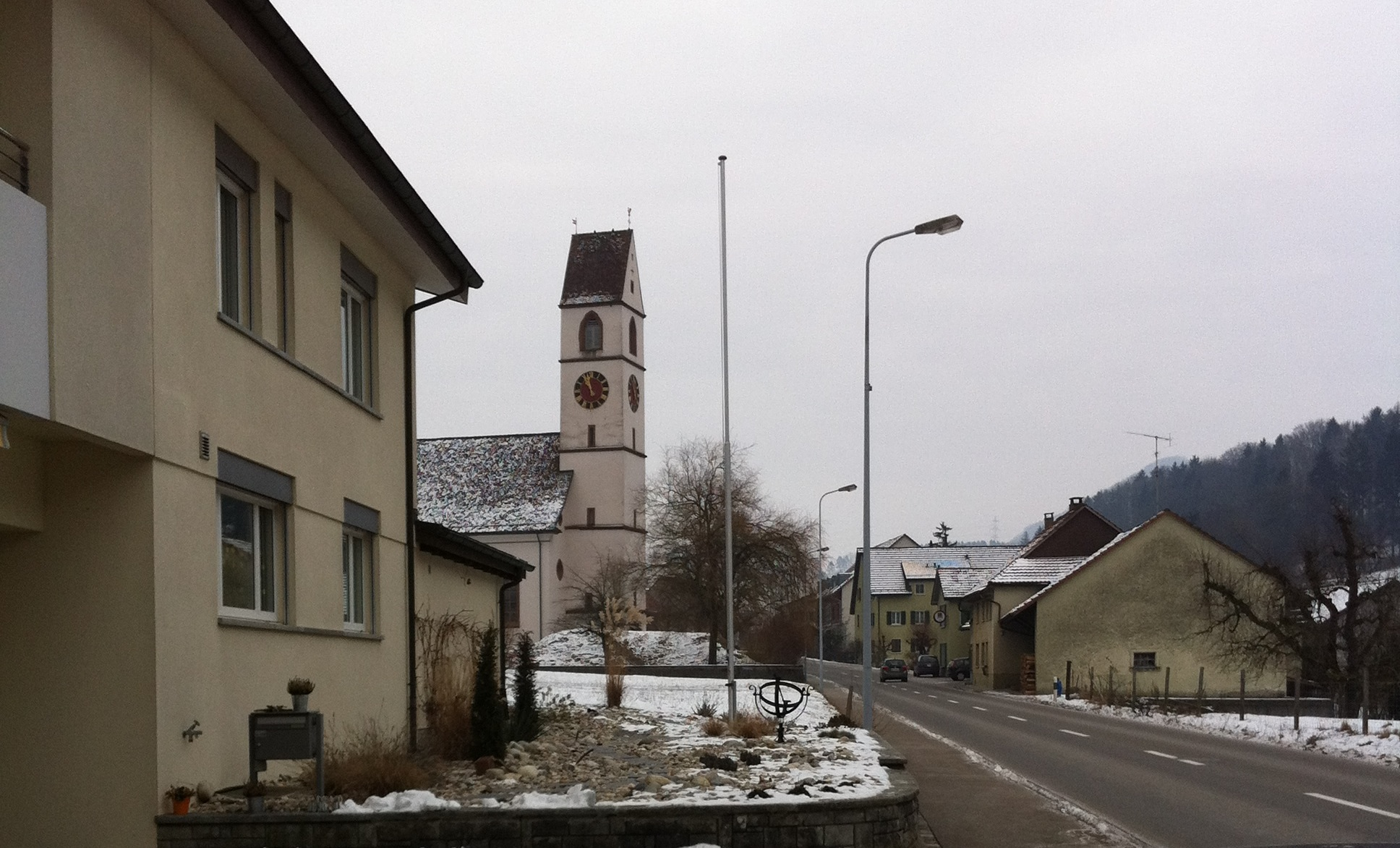 Mettau mit der Kirche